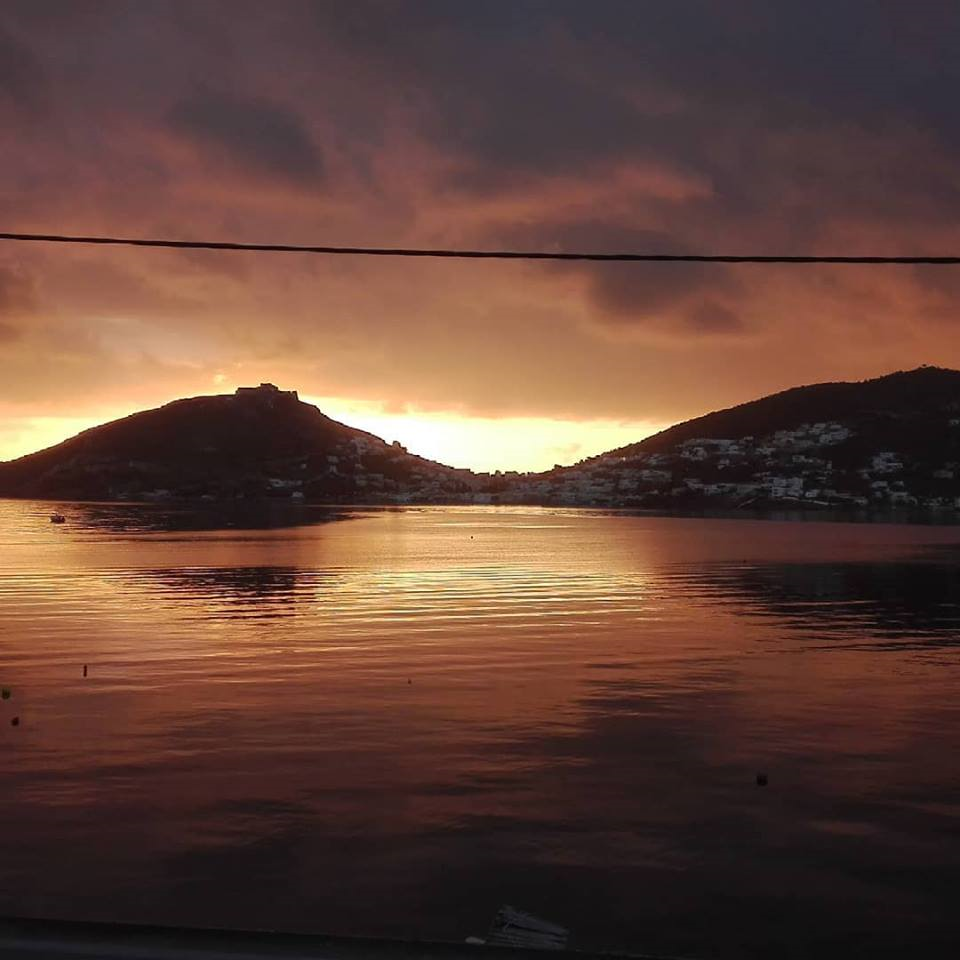 Η θέα από τα Άλιντα την ανατολή με φόντο Αγ.Μαρίνα και Κάστρο